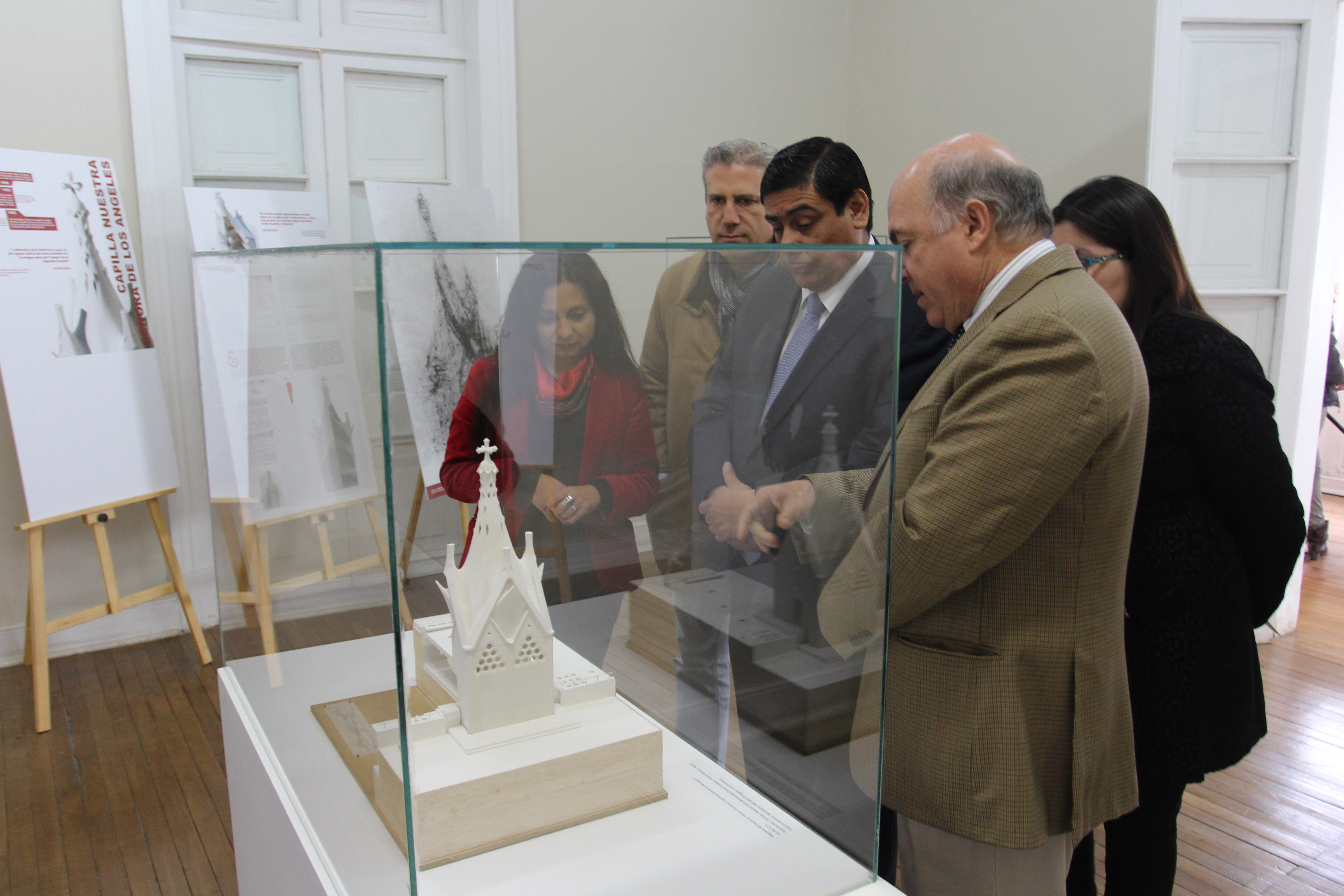 Un paso adelante en proceso para instalación en Rancagua de Capilla diseñada por Gaudí